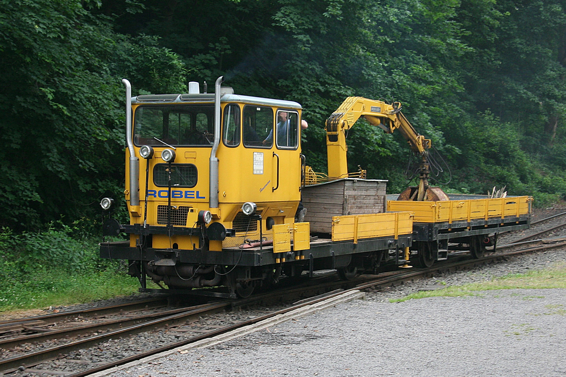 Gleisbaumaschine SKL 53 der Brohltalbahn, ehemaliges Fahrzeug DB Klv 53-0592 der Deutschen Bundesbahn, 1977 gebaut von Robel